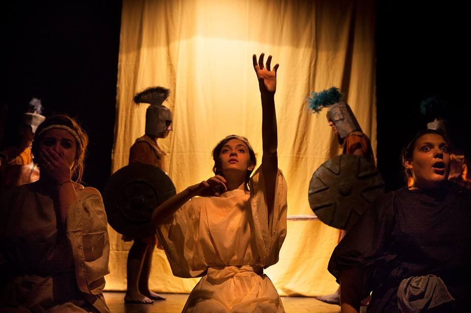 Spettacolo teatrale